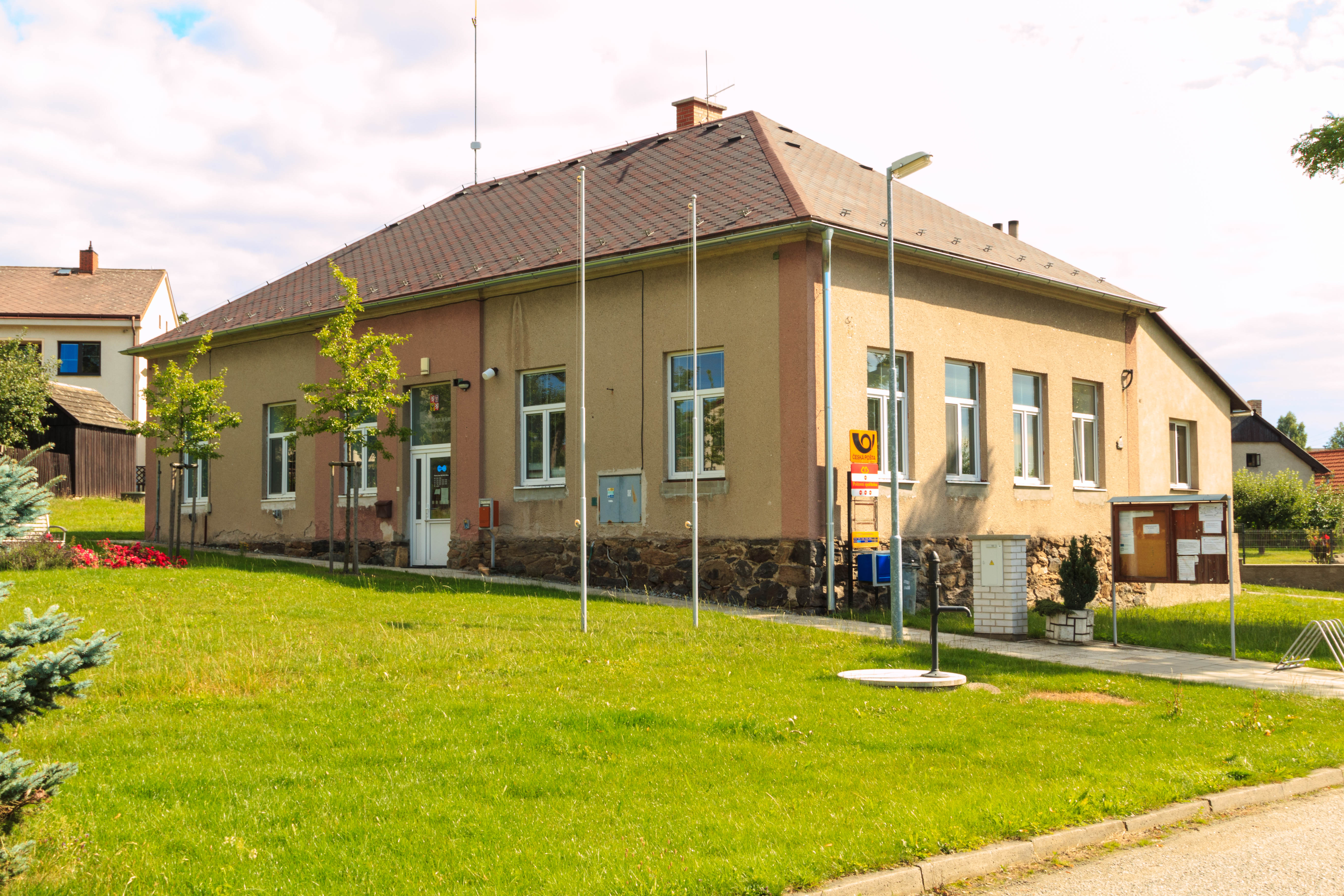 Kámen u Havlíčkova Brodu - pošta